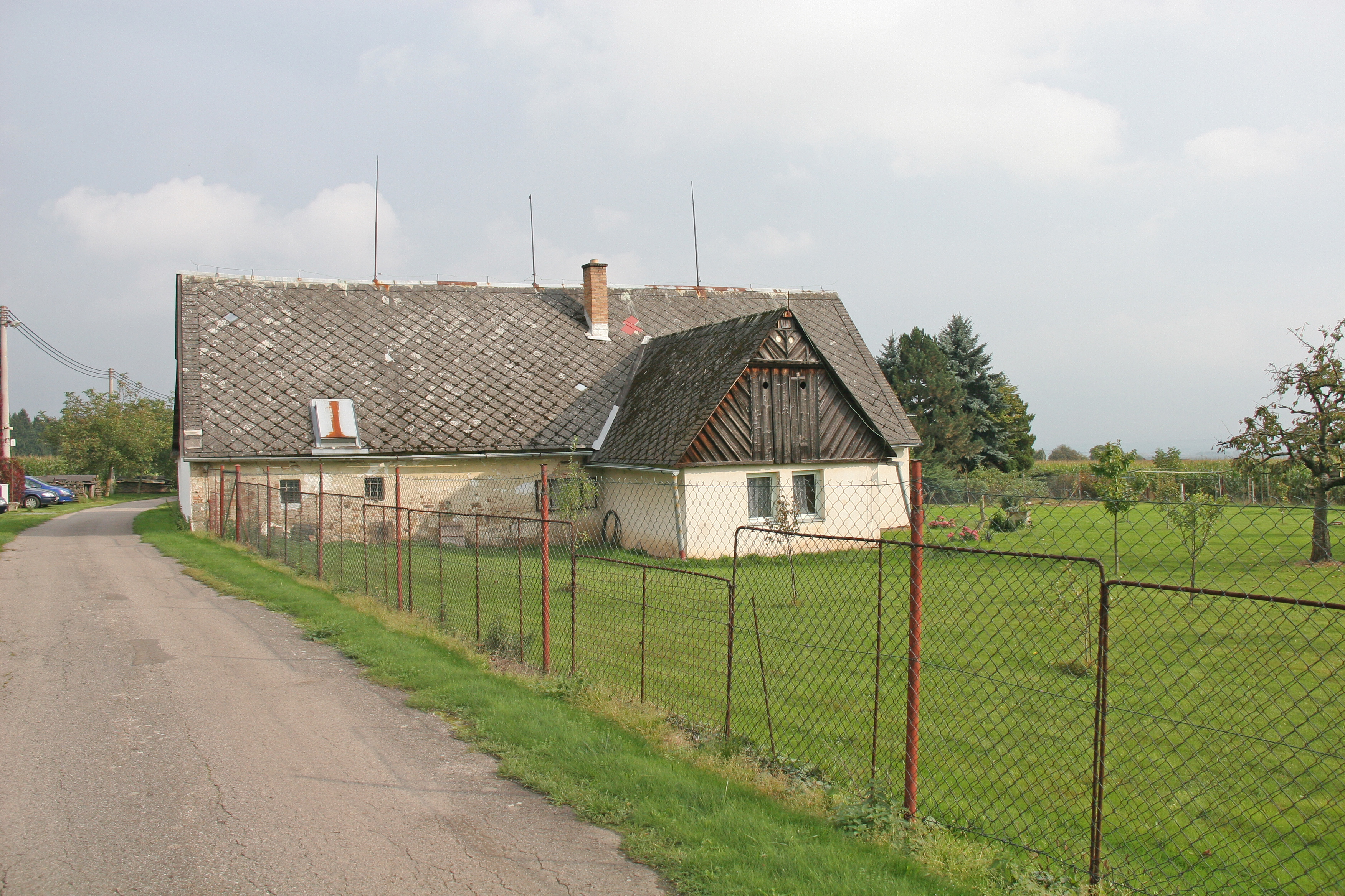 Kopaniny čp. 13